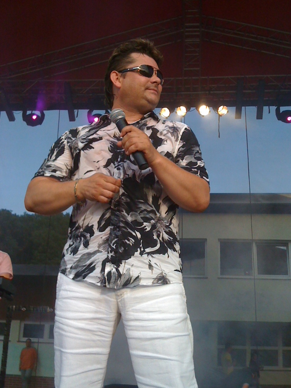 Zenon Martyniuk, wokalista zespołu Akcent na koncercie w Więcborku.